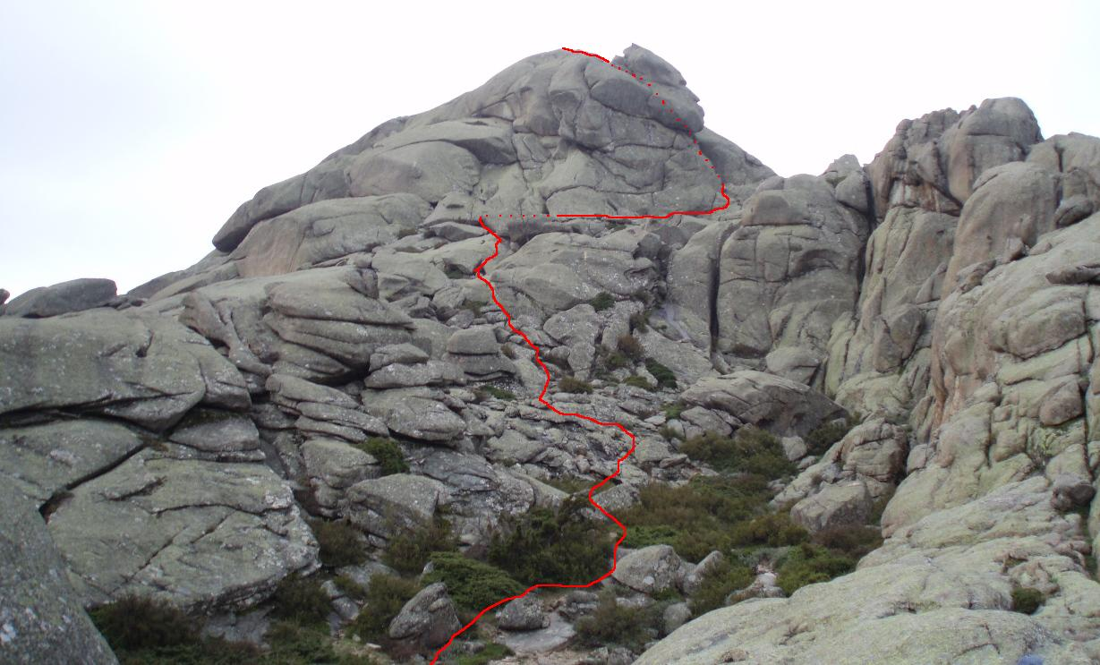 Ascenso por la cara noreste del Risco del Yelmo (1.717 m), en La Pedriza (Comunidad de Madrid, España).